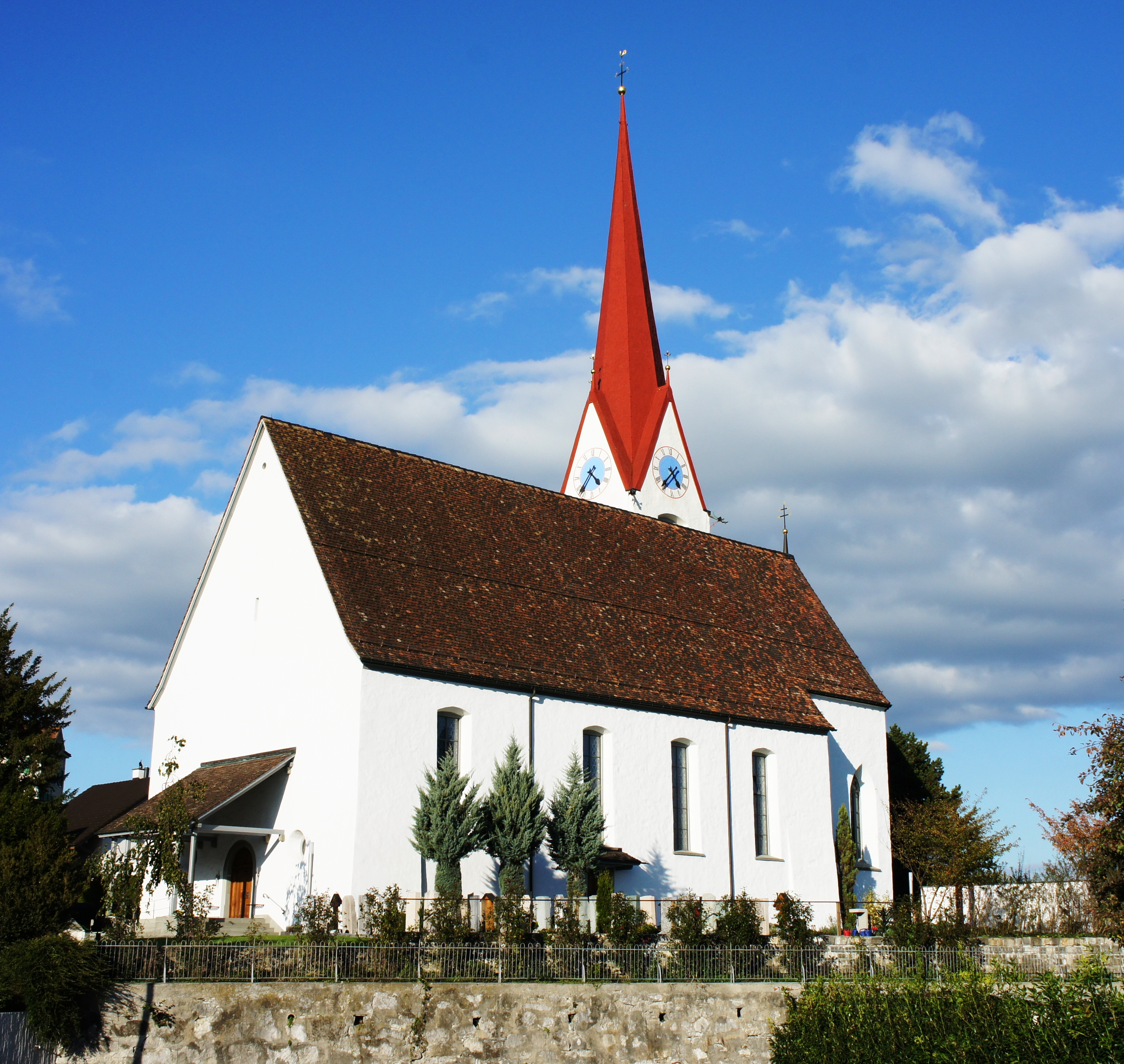 Blick auf die Pfarrkirche in Montlingen aus südwestlicher Richtung. Links ist der überdachte Haupteingang. Rechts vor dem Seiteneingang befindet sich der Friedhof.